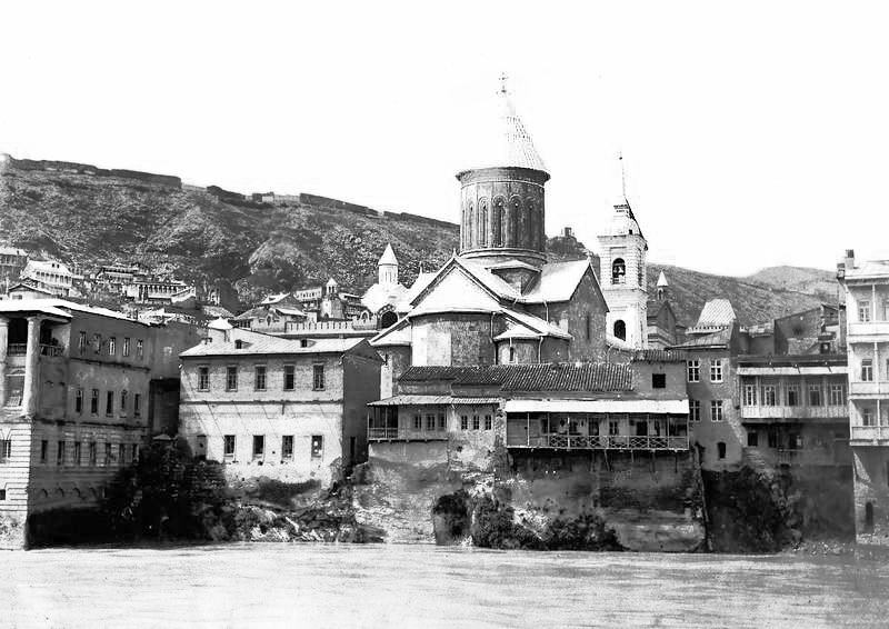 Bild der Sioni-Kathedrale in Tiflis. Im Vordergrund der Kura-Fluss.